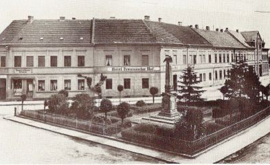 Der Elsterwerdaer Denkmalsplatz (Scheunenplatz) um die Jahrhundertwende (1900)